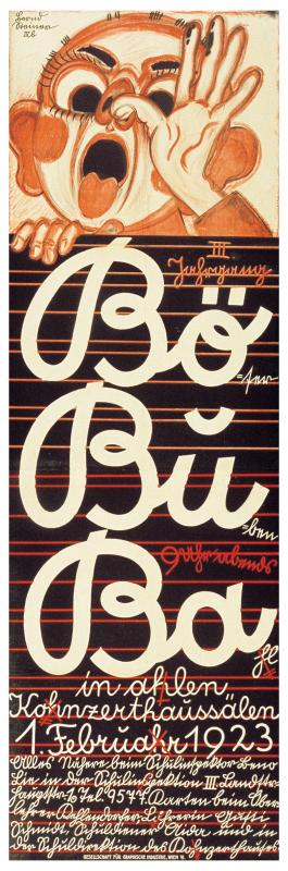 "Böser Buben Ball in allen Konzerthaussälen 1923". Gesellschaft für graphische Industrie, Wien 1923 Lithographie, 169 cm x 54 cm ÖNB Bildarchiv und Grafiksammlung (POR), Signatur PLA16308875